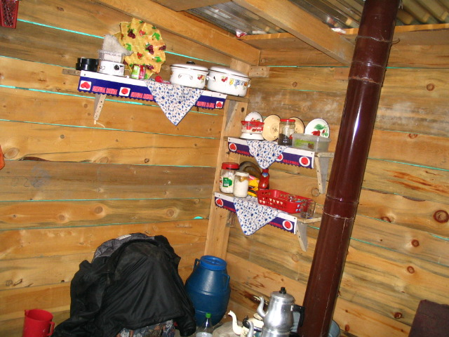 Yayla evi